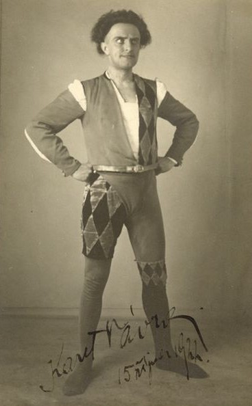 Karel Vávra (herec a malíř) 1884-1931